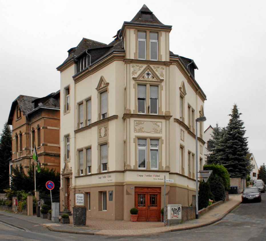 Das Geburtshaus von Charles Bukowski in der Andernacher Aktienstraße 12, Ecke Aktienstraße/Im Winkel